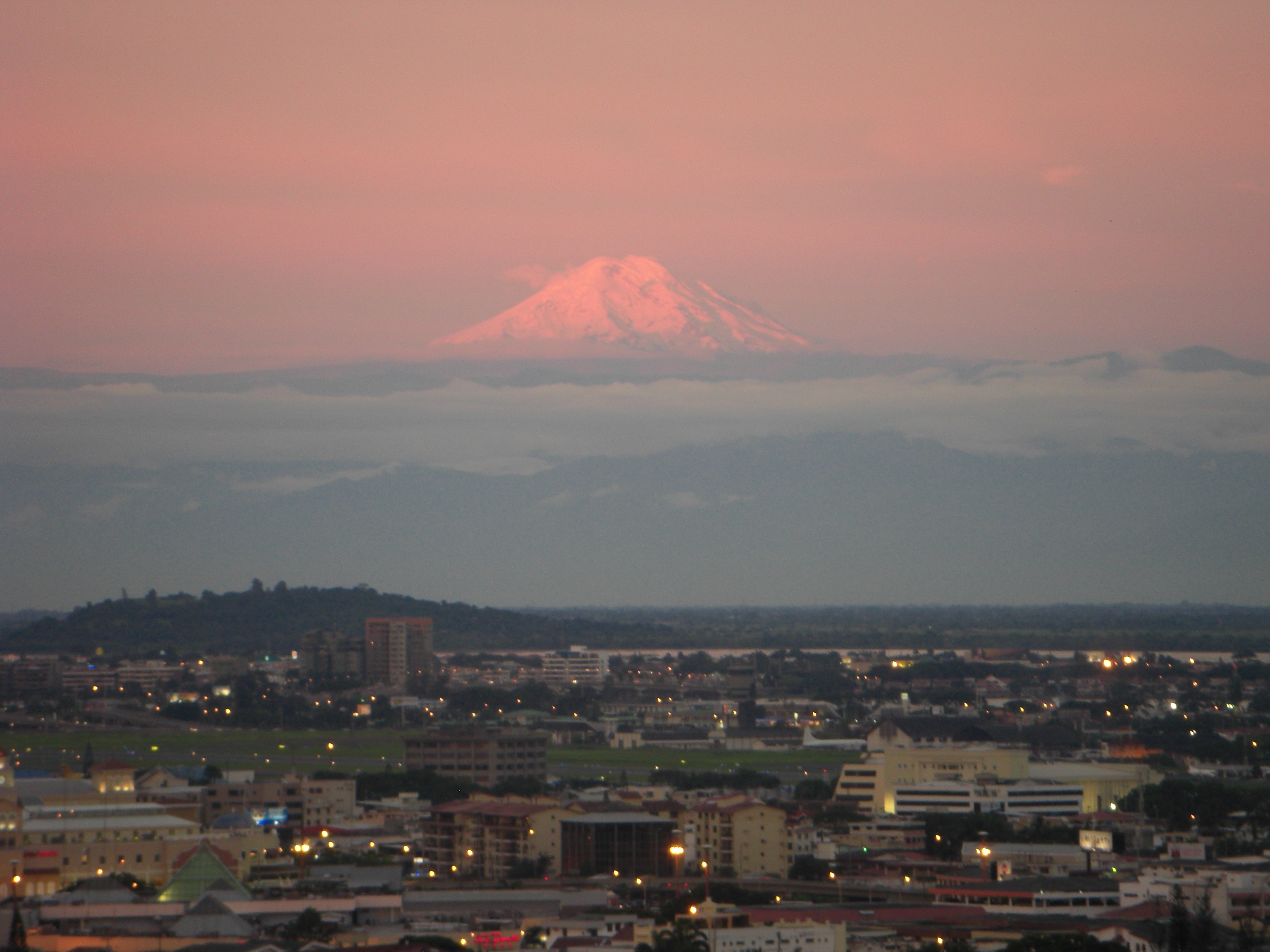 Fotografía del volcán Chimborazo desde Guayaquil, Ecuador